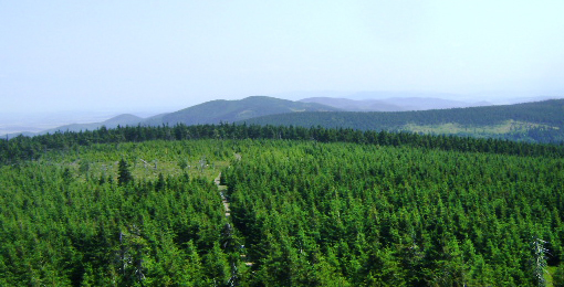 Wzniesienie w Sudetach Środkowych, w środkowej części pasma Gór Sowich.